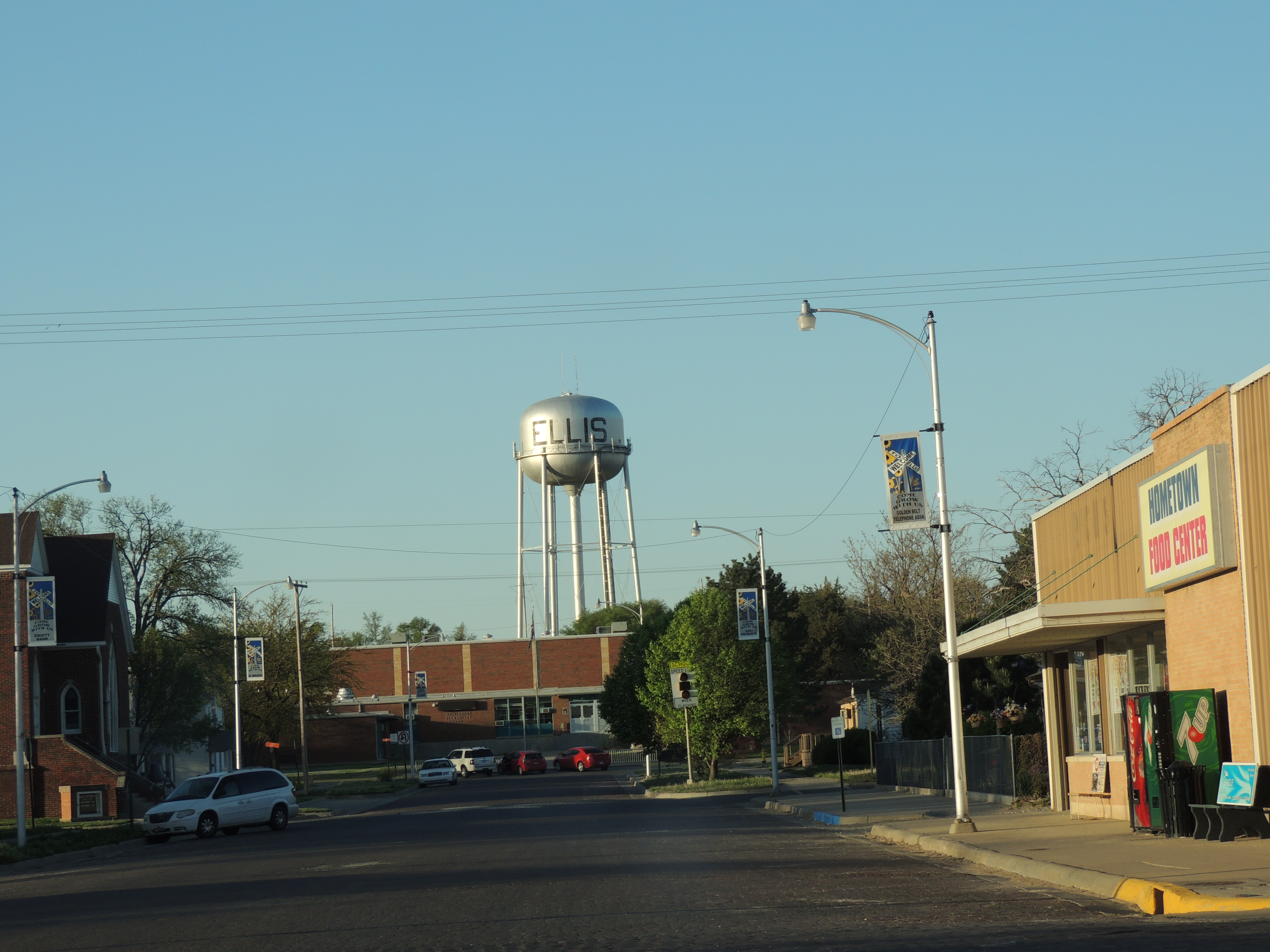 Ellis Kansas